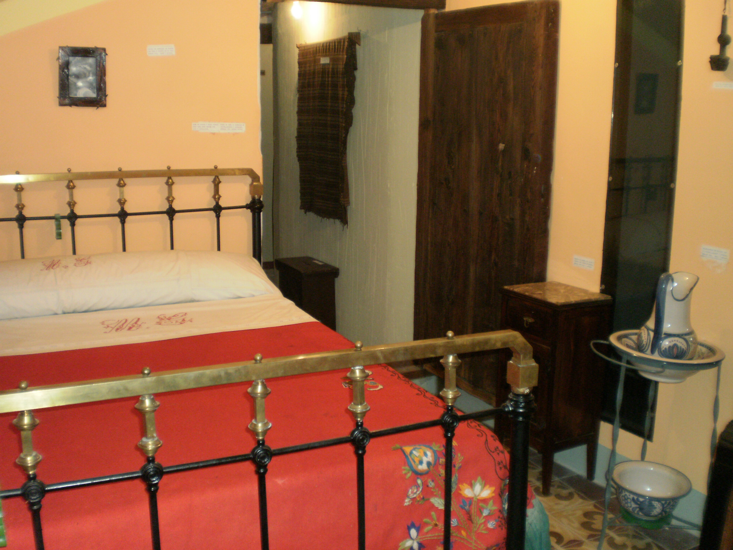 Chillaron de Cuenca herria, Gaztela La Mantxa.